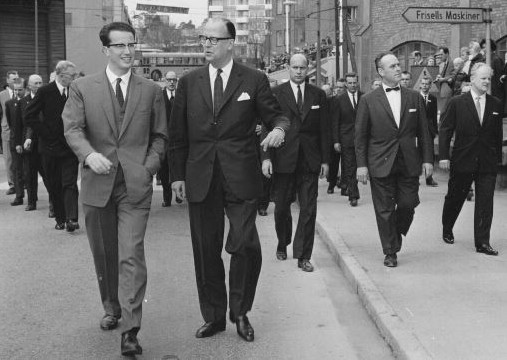 Kung Baudoin från Belgien besöker Atlas Copco i Sickla Industriområde. Till höger om honom går Kurt Allan Belfrage, som vid tidpunkten för fotot var VD för Atlas Copco. Foto 1964.